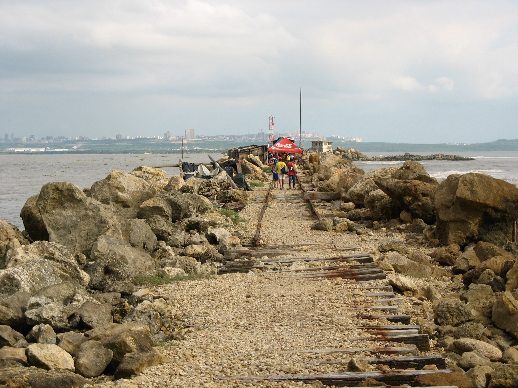 Tajamar oriental de Bocas de Ceniza